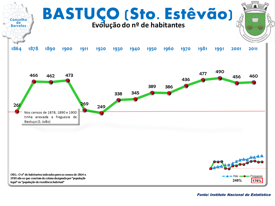 Censos 1864/2011